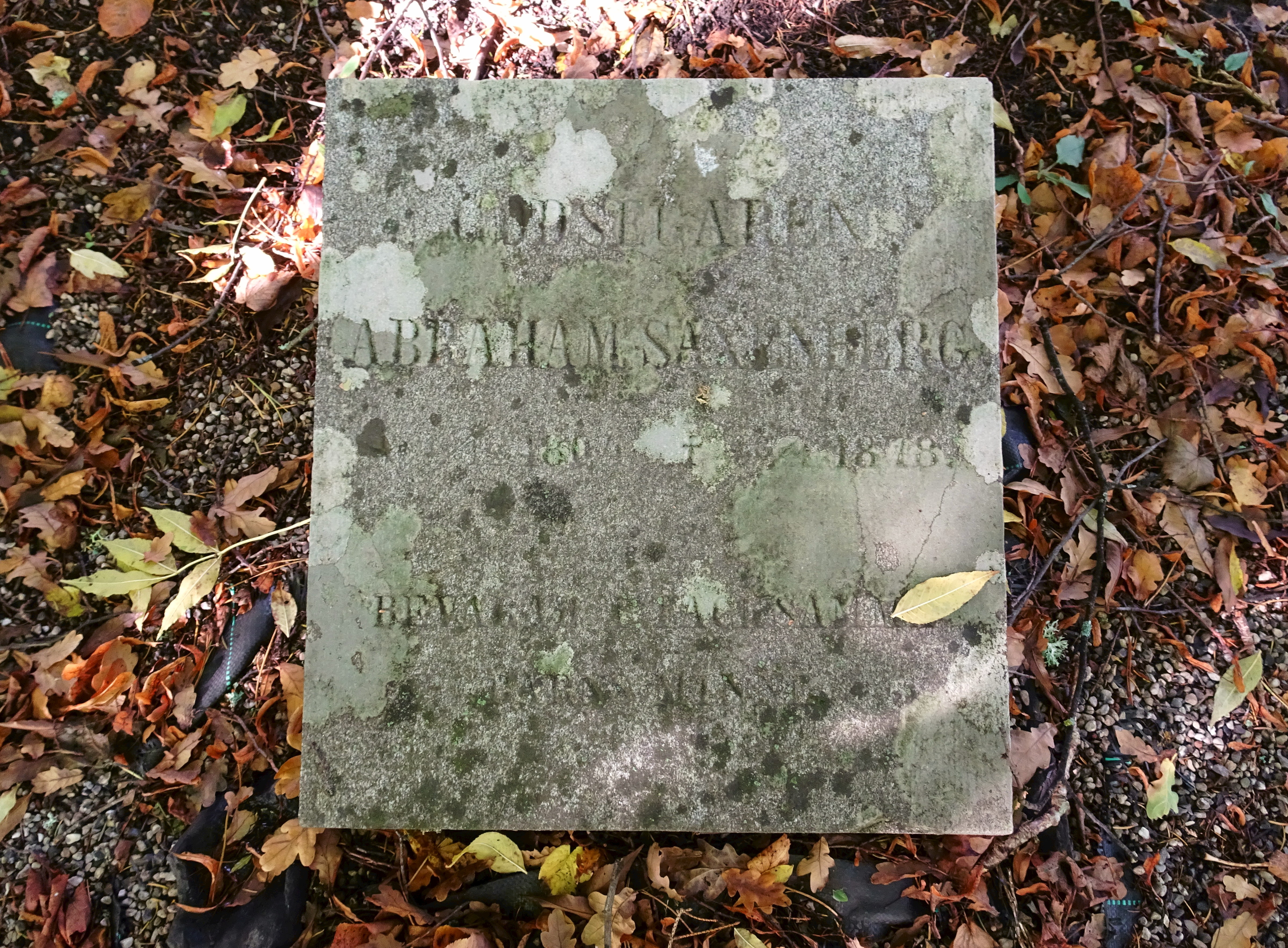 Årsta slott, minneslund, gravsten för Abraham Saxenberg